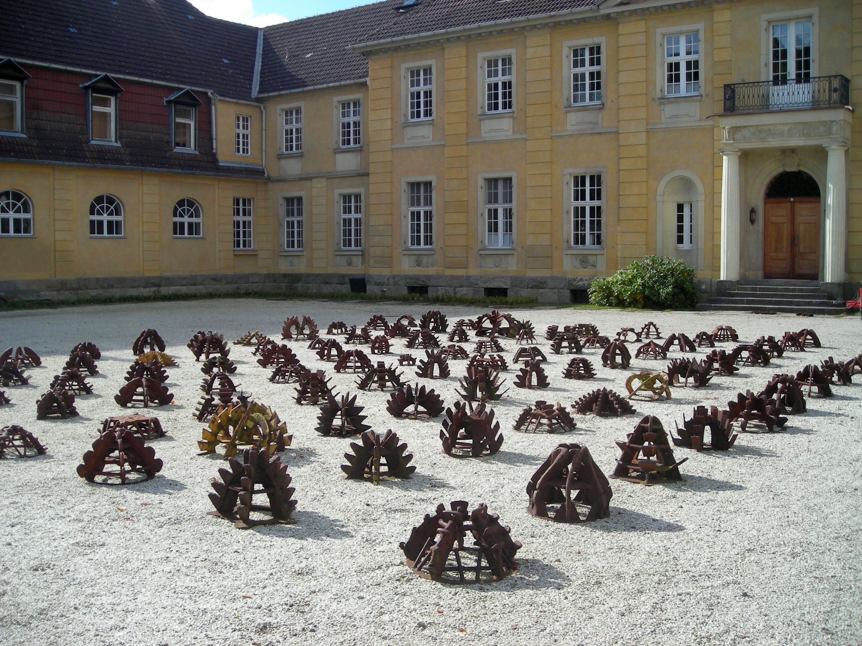 Bohrkopf Installation im Vorplatz vom Schloss